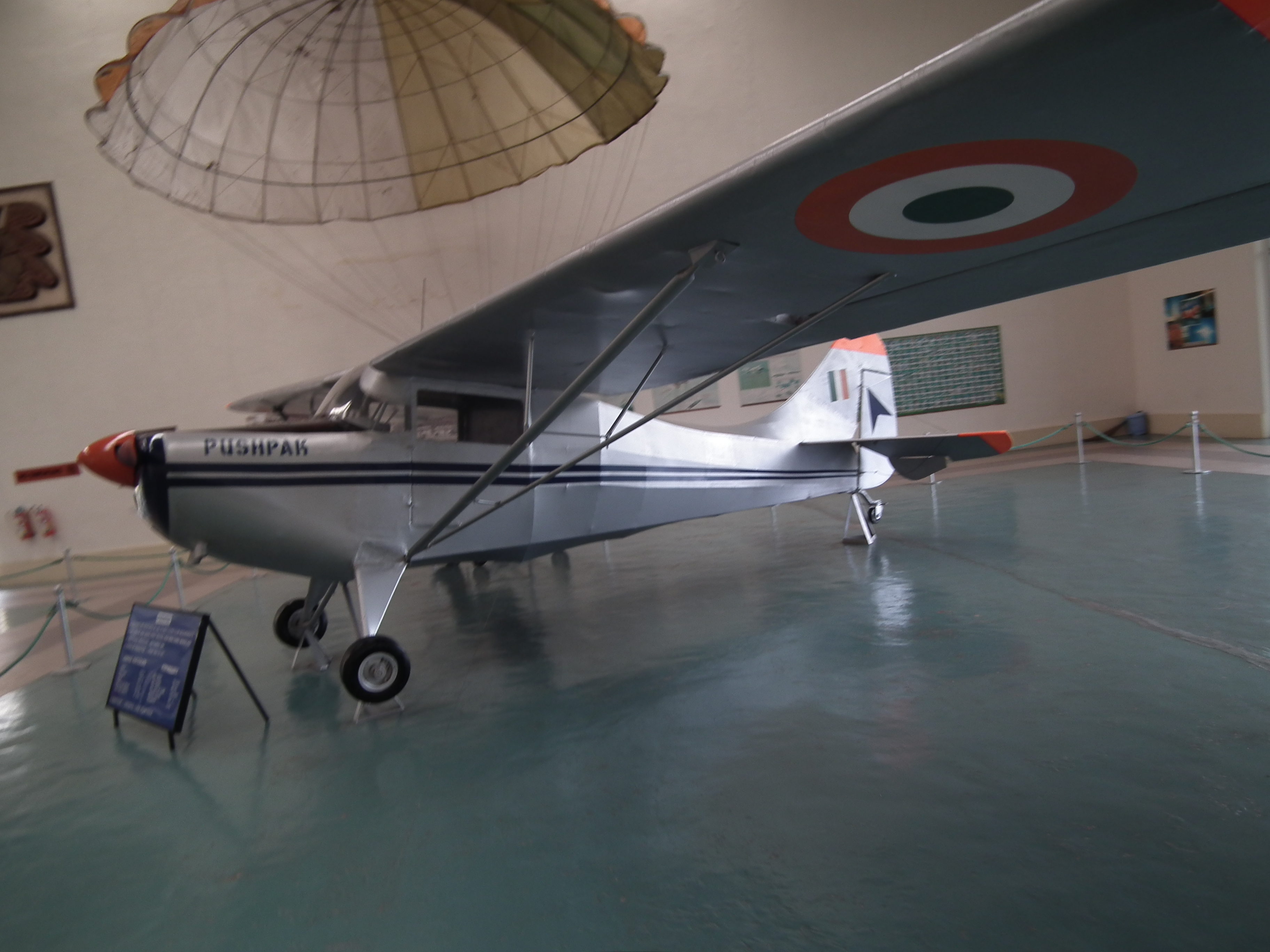 HUL-26 Pushpak at HAL Museum diplayed at HAL Museum